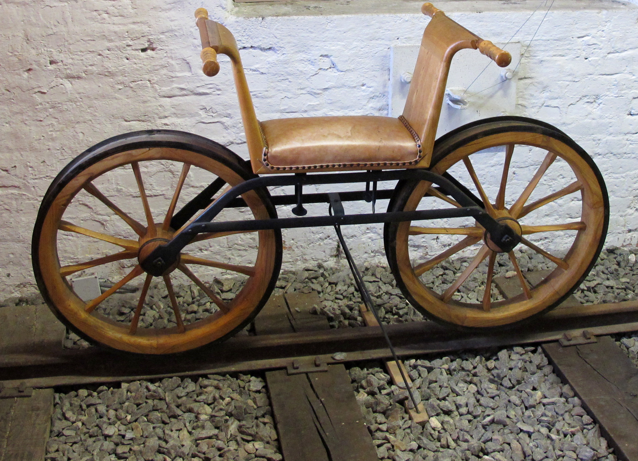 Historische Laufdraisine, ausgestellt im Südbahnmuseum Mürzzuschlag